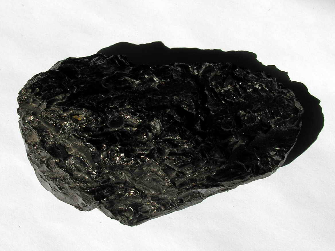 antracita, antracita